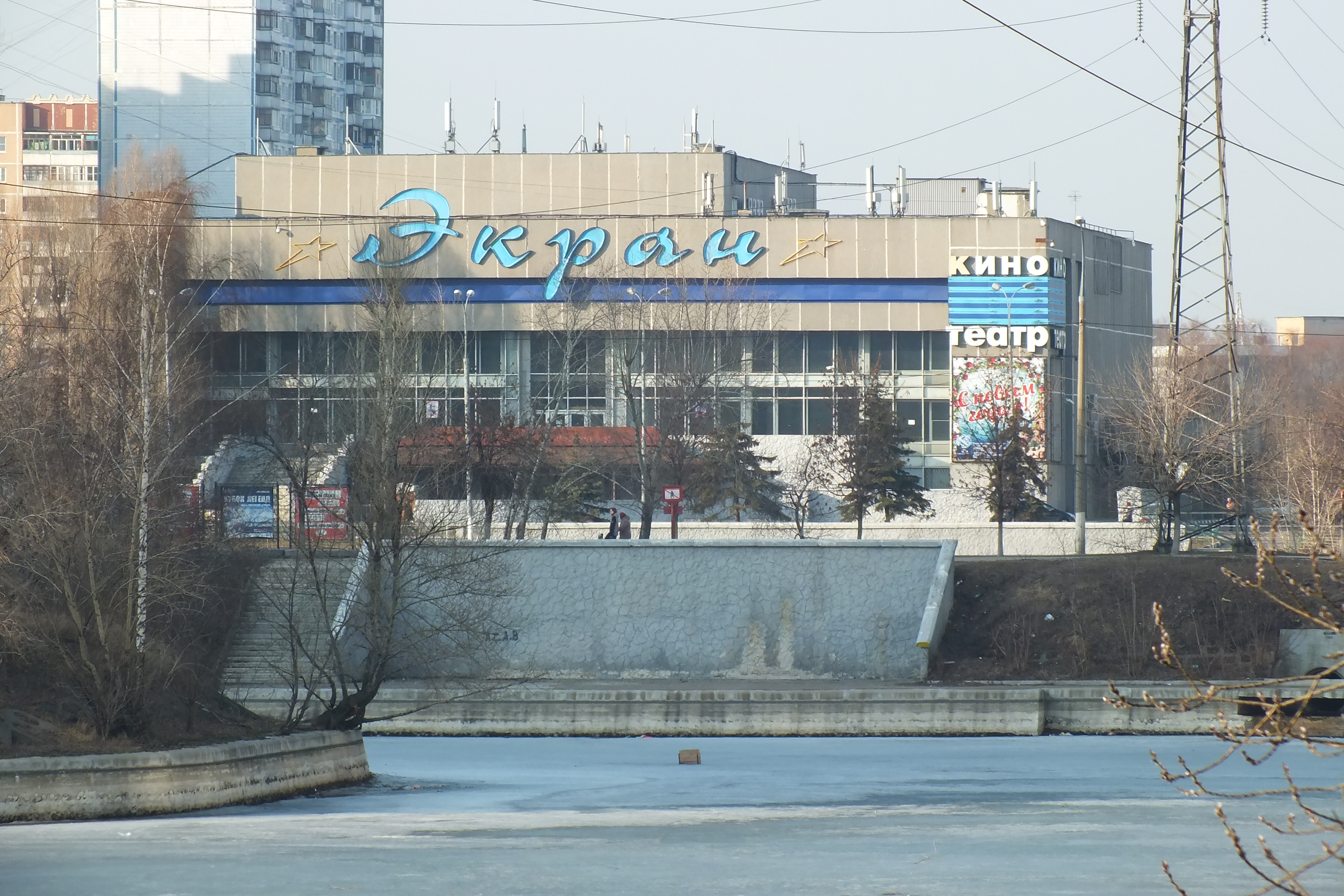 Кинотеатр «Экран» на Новочеркасском бульваре в Москве.